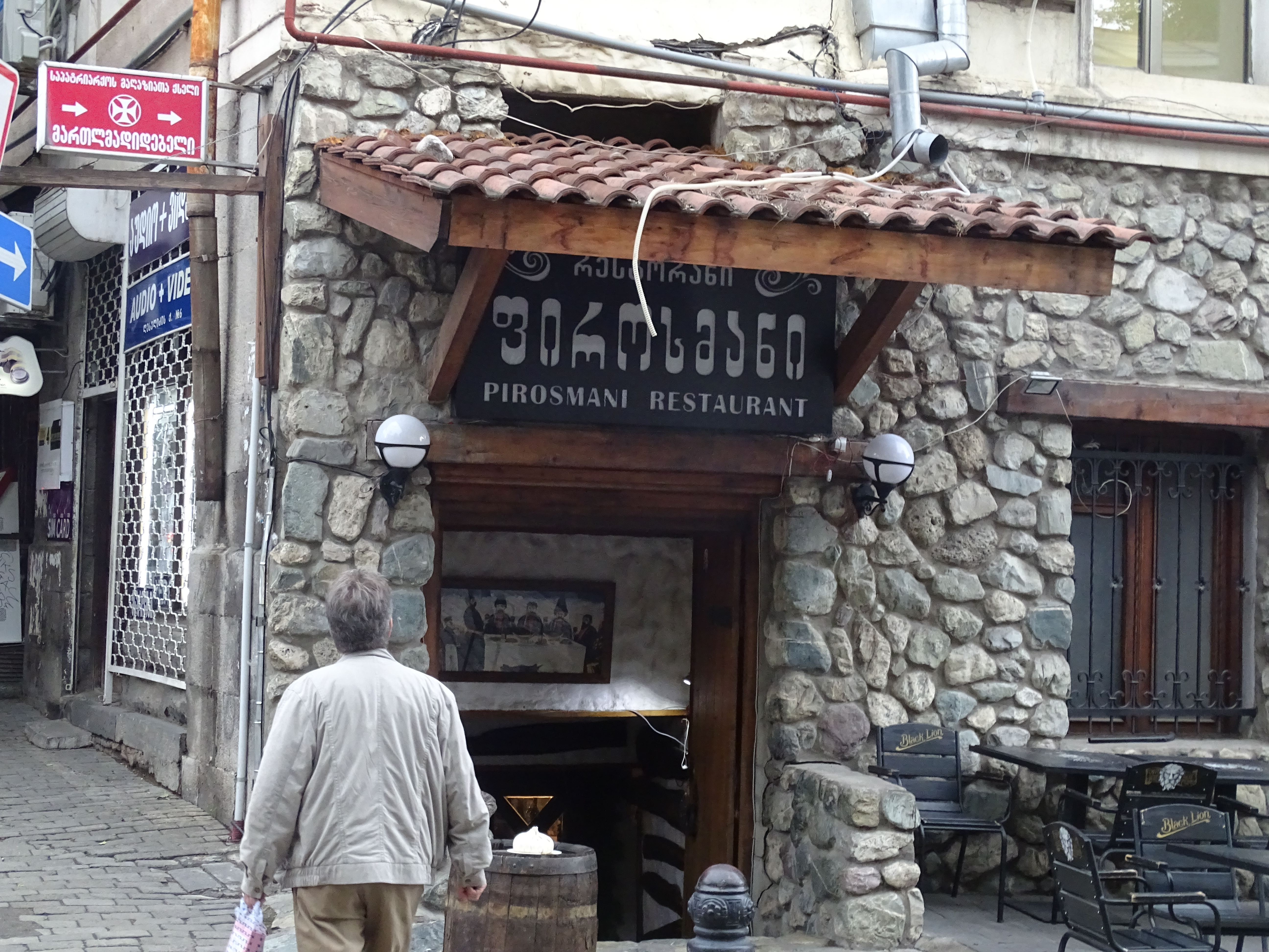 Restaurant in Tiflis benannt nach Niko Pirosmani